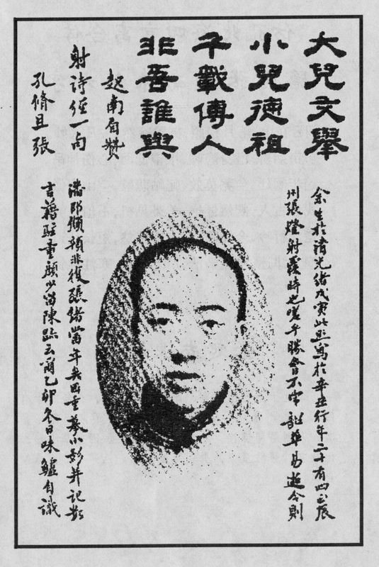 张起南（1878年－1925年）字味鲈，号橐园，福建永定人，中国灯谜界知名人士。